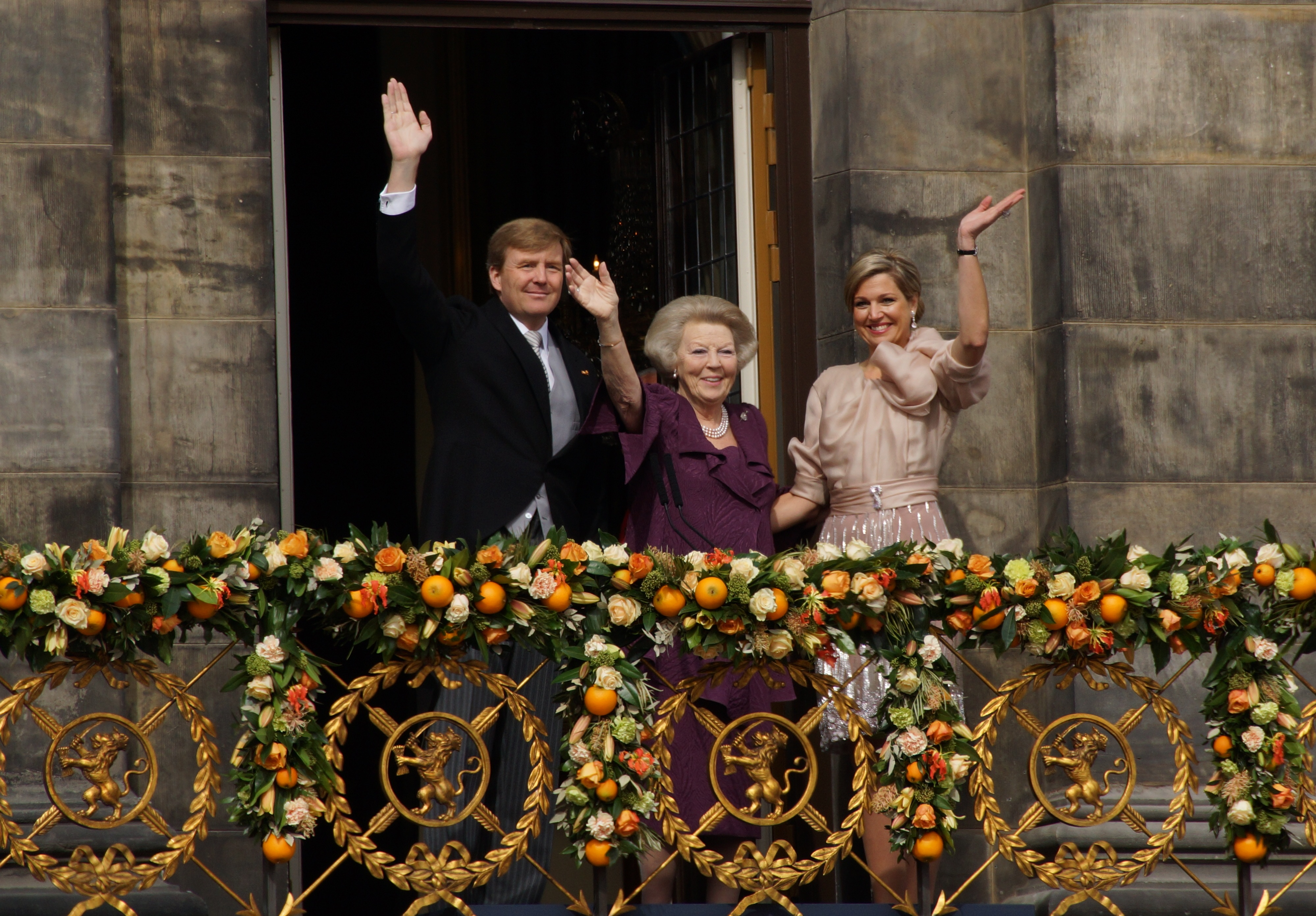 Koning Willem-Alexander, Prinses Beatrix en Koningin Maxima na de aankondiging dat Beatrix afstand van de troon heeft gedaan.